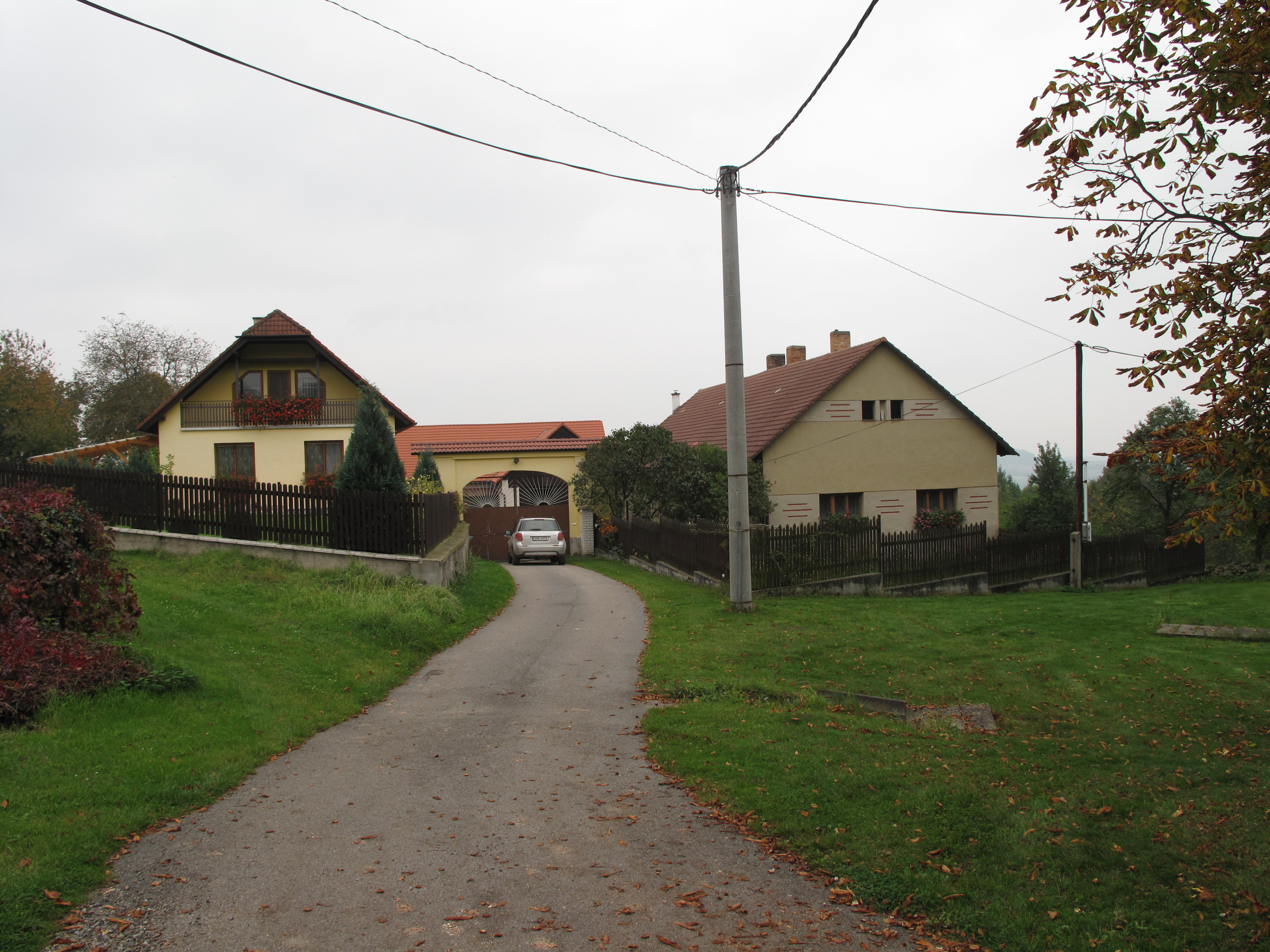 Statek v Jelenči. Okres Benešov, Česká republika.